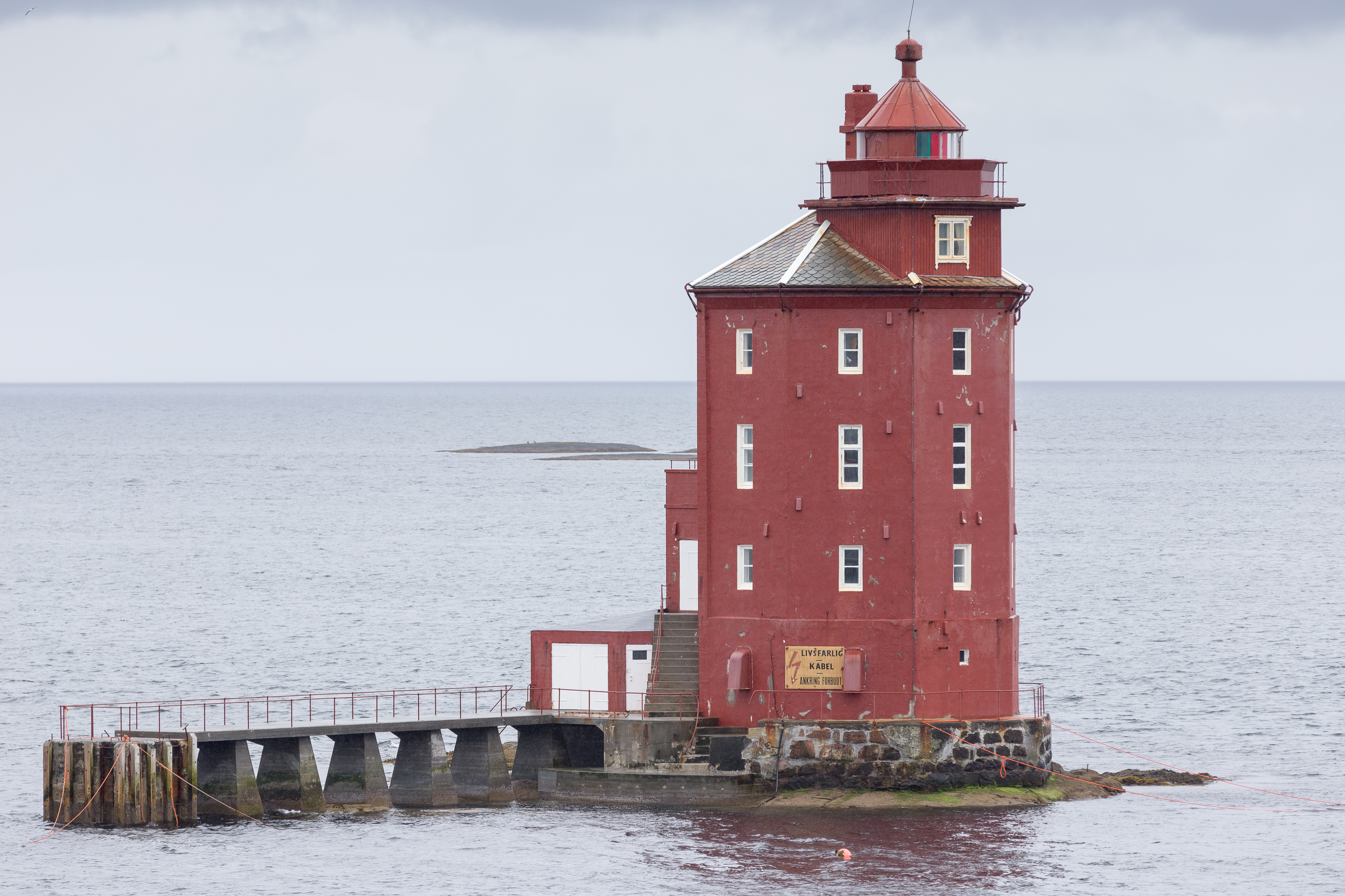 Kjeungskjær Fyr, Baujahr 1880, Norge (Juni 2015)